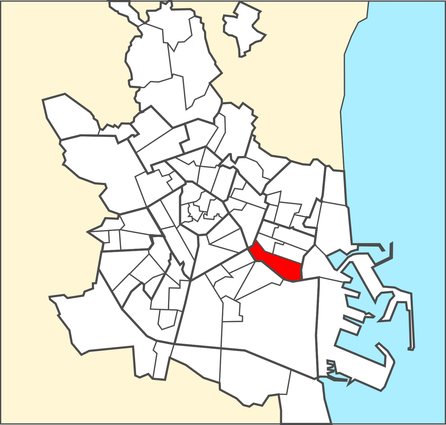 Localització del barri dins de la ciutat de València.